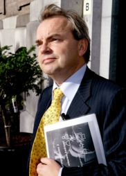 Steven van Eijck; Staatssecretaris van Financiën (2002-2003)